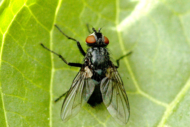 Picture taken in Commanster, Belgian High Ardennes . Species: Blondelia nigripes